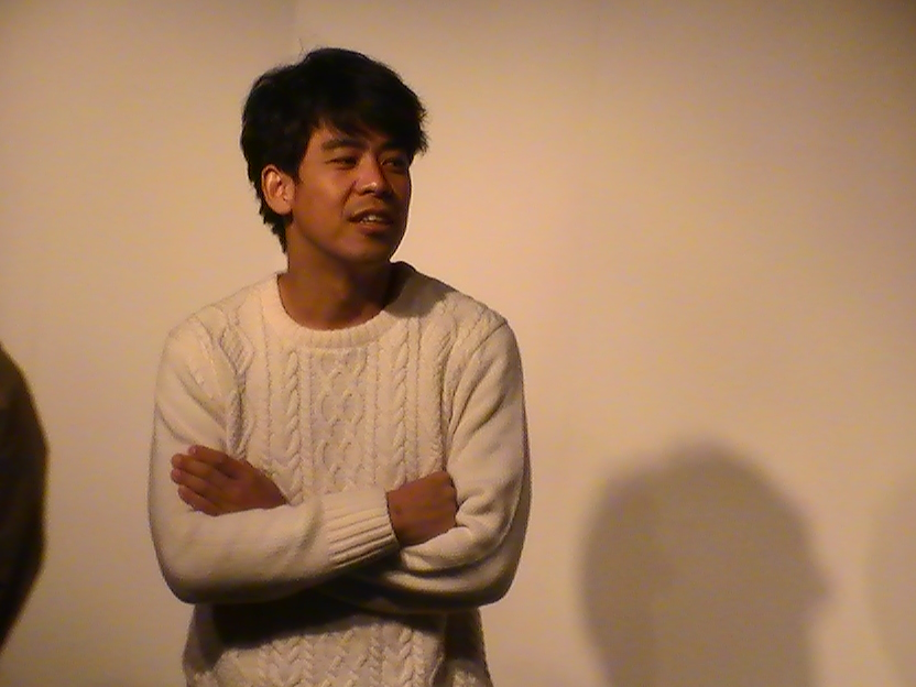 ギフト☆矢野 (2017年2月4日)